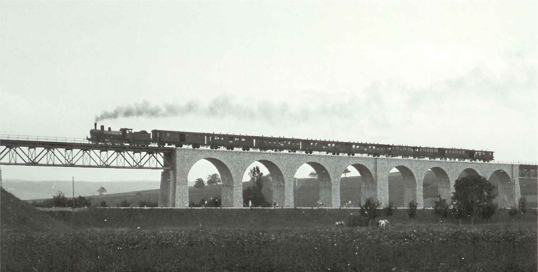 Mösliviadukt der Münster-Lengnau-Bahn. Er hat eine Länge von 288,3 m und besteht aus 14 Steinbogen-Öffnungen und 2 Öffnungen, die mit Eisenkonstruktionen überbrückt werden. Die höchste Höhe über Boden beträgt 18,3 m.